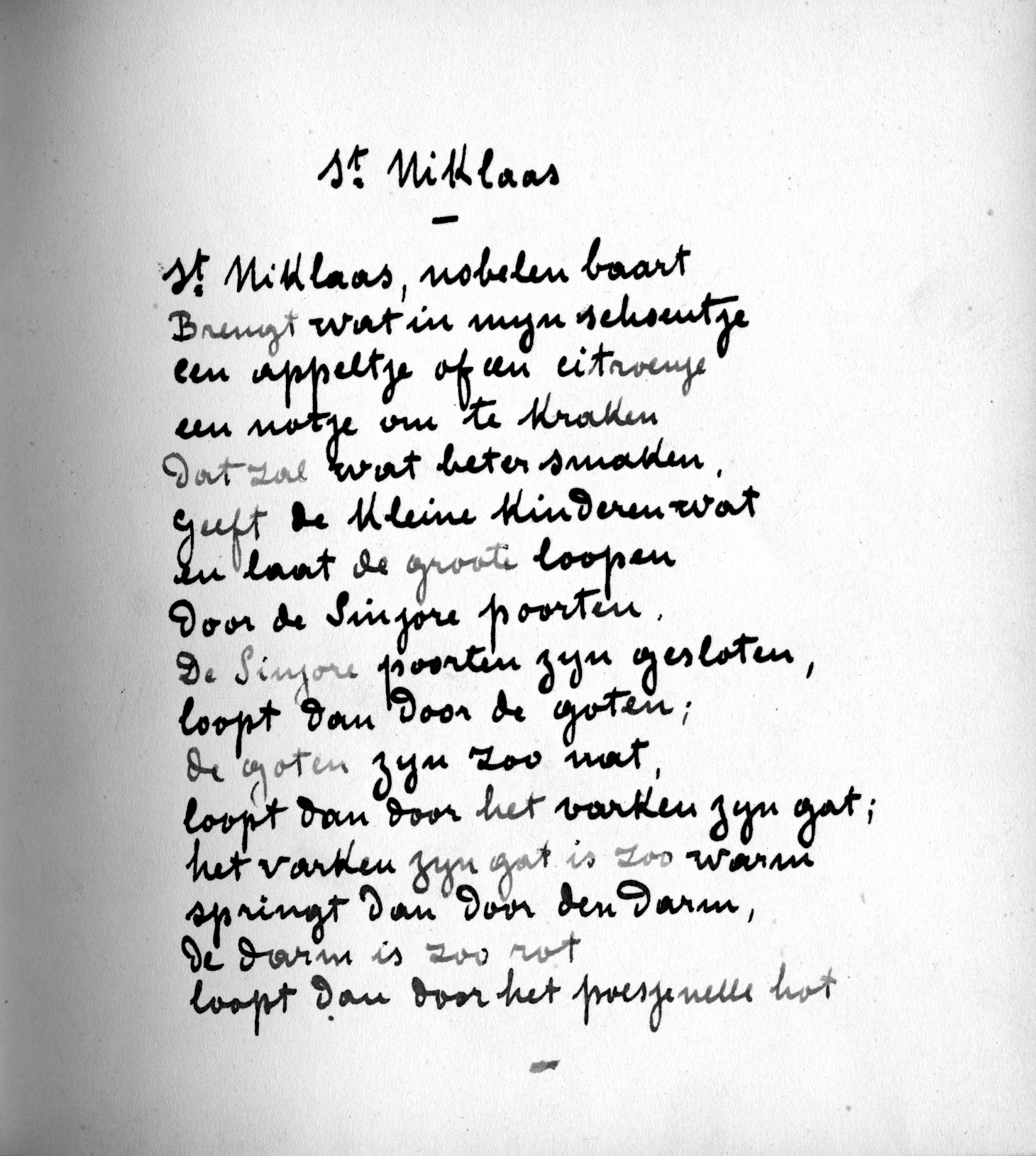 FS12 00034/001 in de CFWB-AML Max Elskamp fonds.